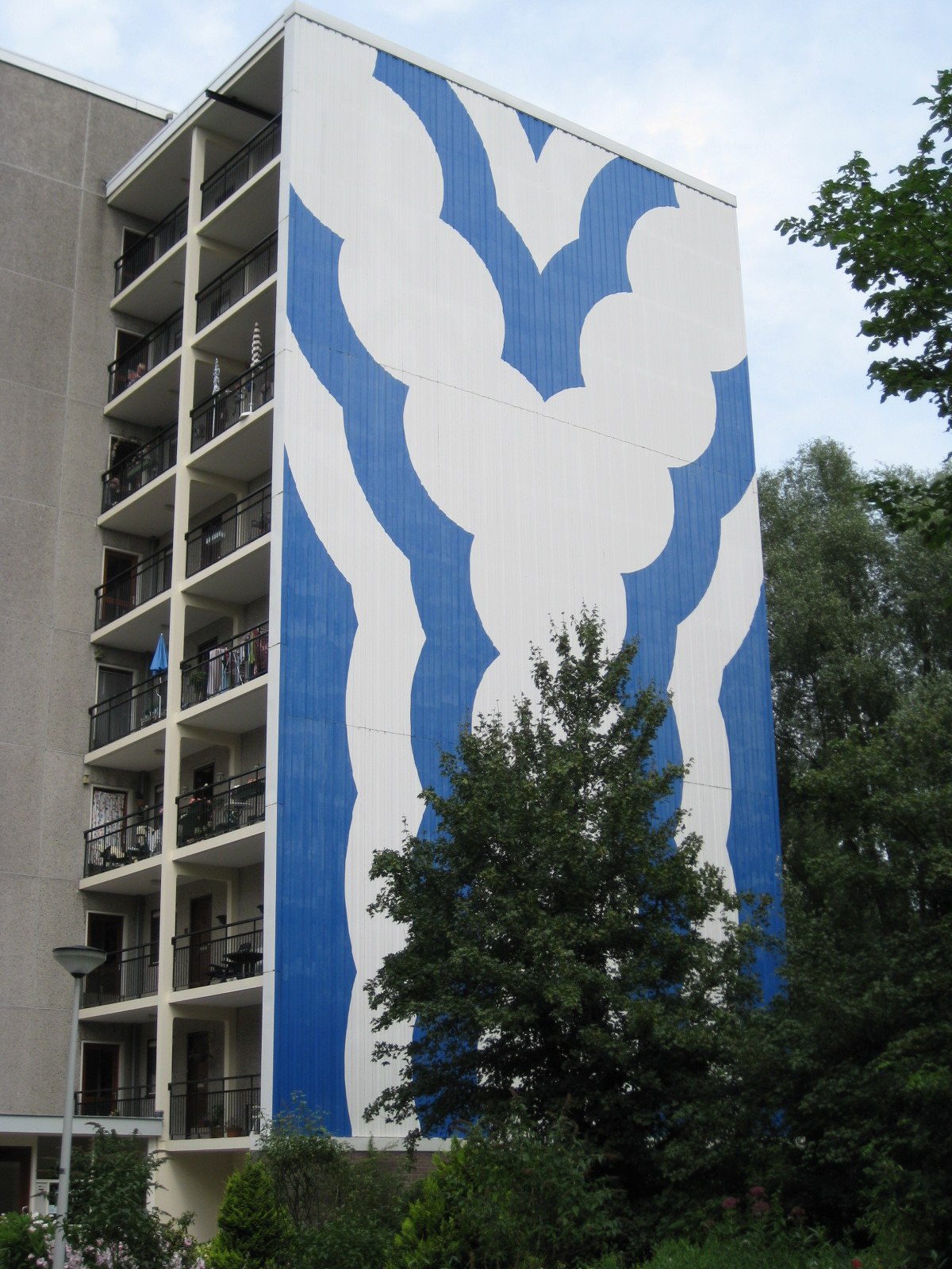 Muurschildering van Hans Koetsier, 1977, Amerbos, Amsterdam-Noord